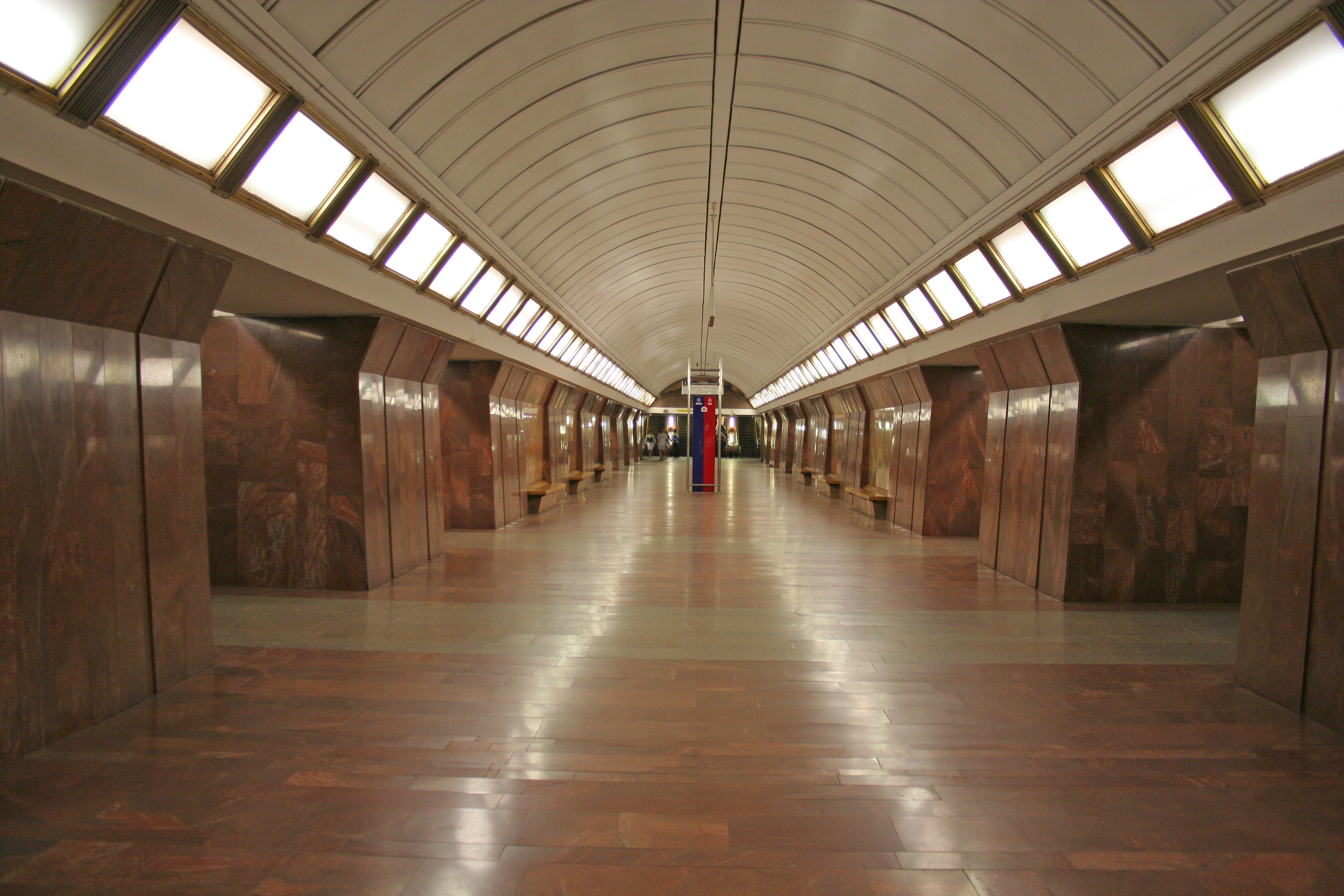 U-Bahnhof Dmitrowskaja der Metro Moskau.